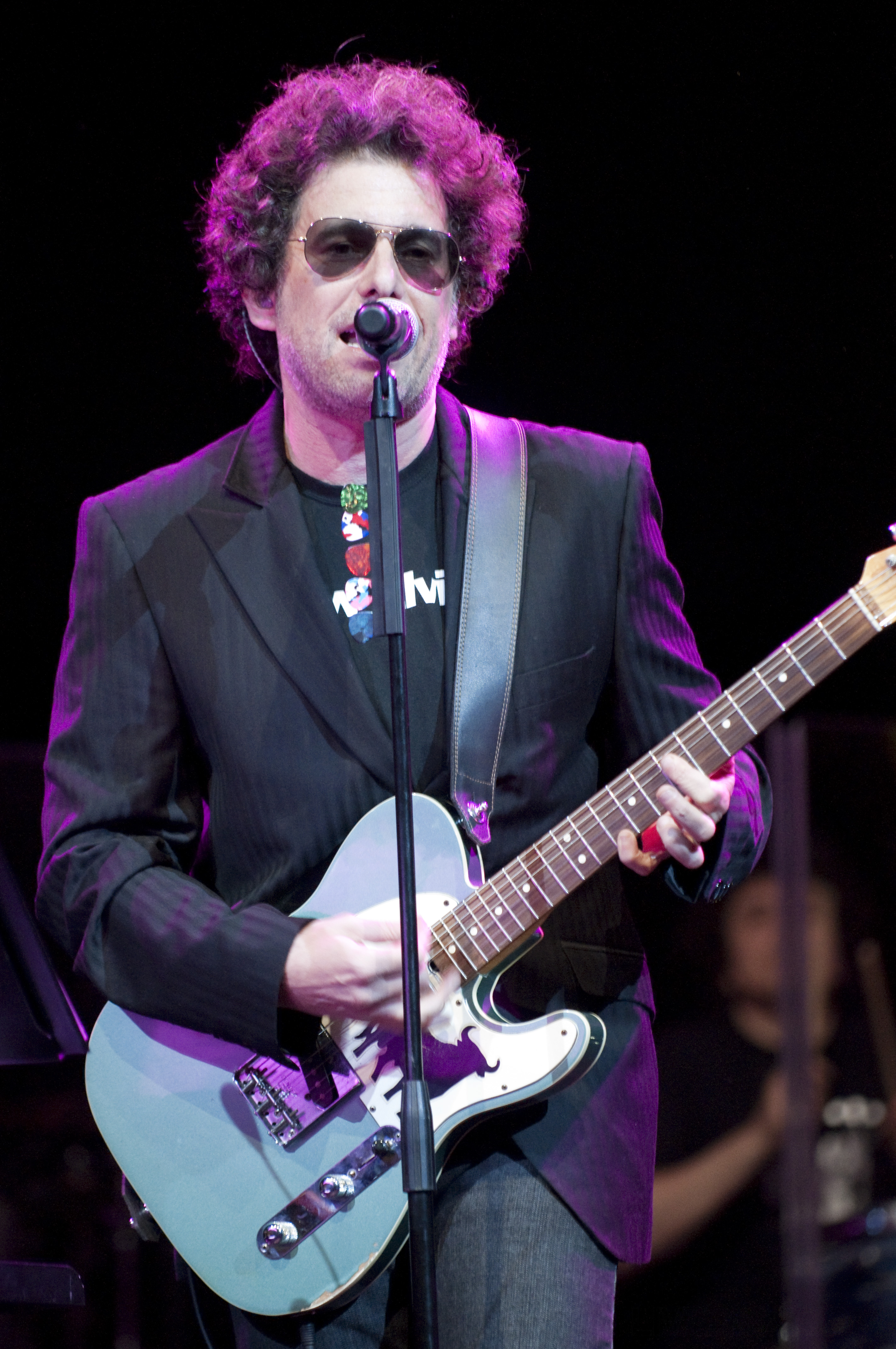 Andrés Calamaro